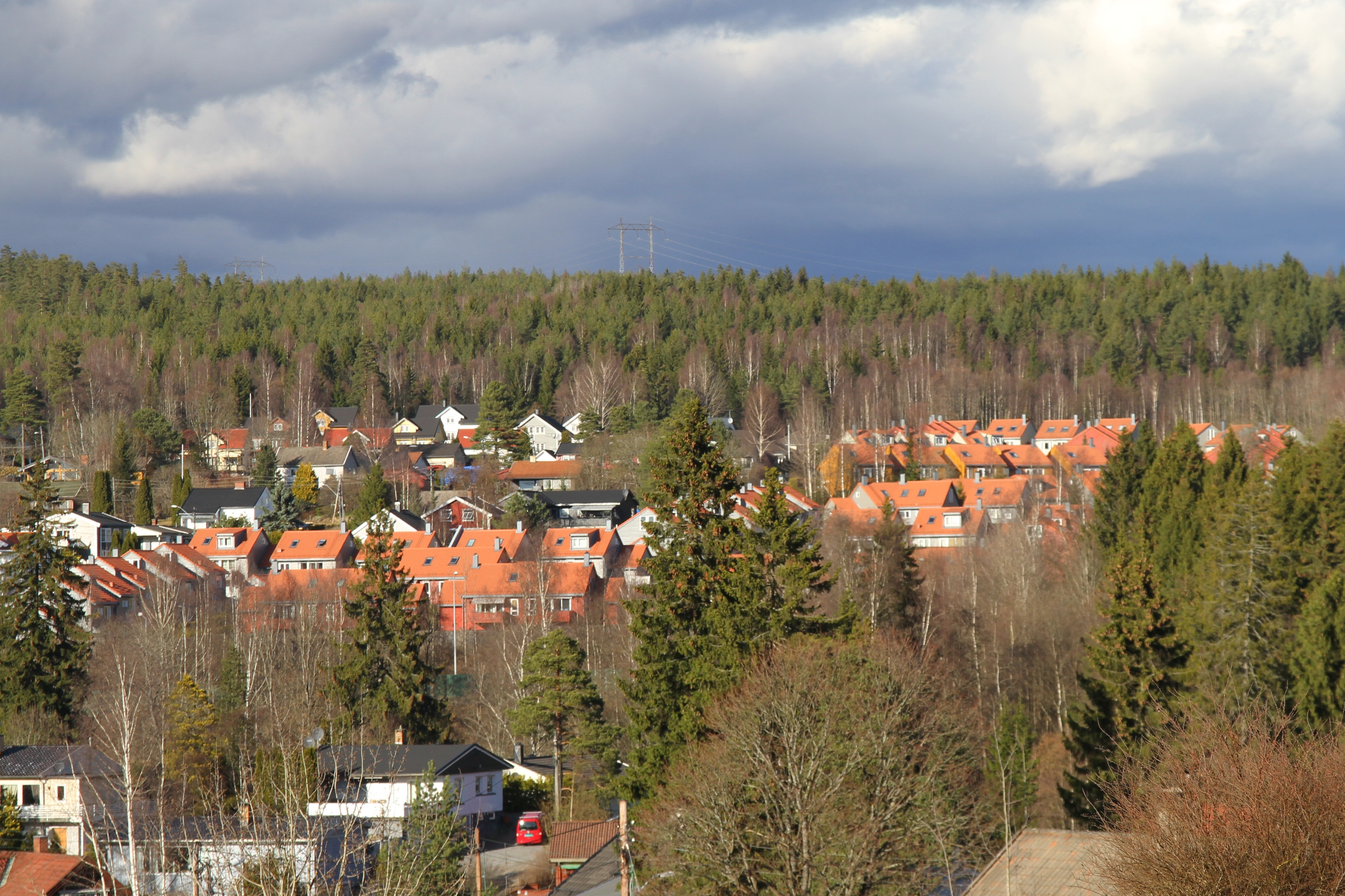 Tangerud. Bydel Stovner i Oslo.